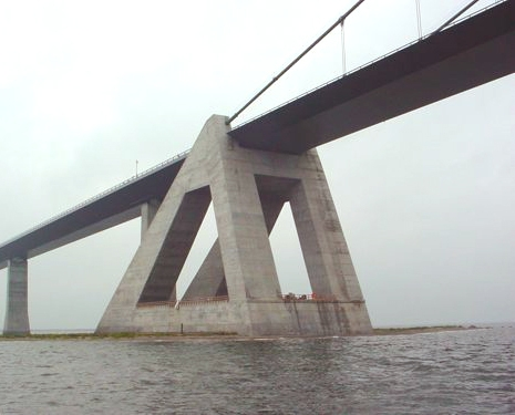 Storebaelt-Bréck 101 Source:Eege Foto vum Benutzer: RKraasch aus dem Niwwel gezunn a méi hell gemaach vum User:Cornischong.